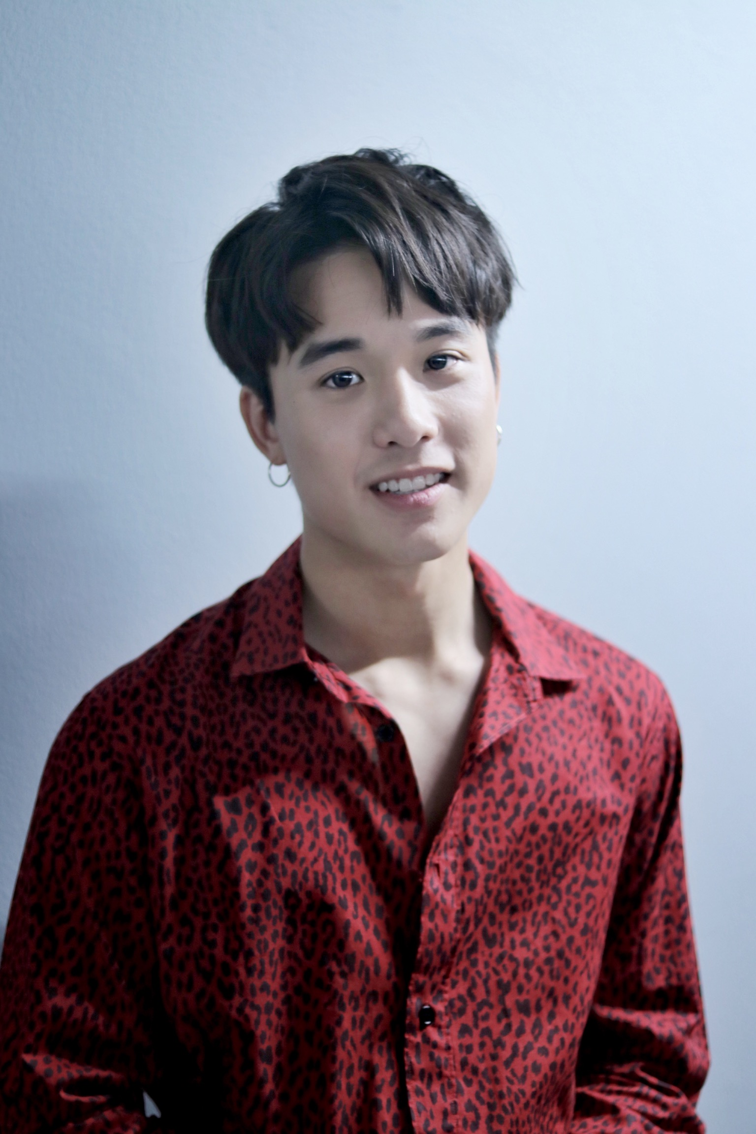 James in Siam center © Cancanisstory This photo is my copyright.